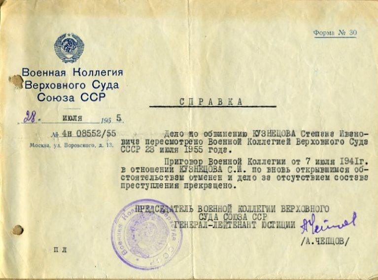 Справка о реабилитации Кузнецова С.И. за отсутствием состава преступления. Реабилитацию производил А.А.Чепцов (тот же, кто и вынес приговор).